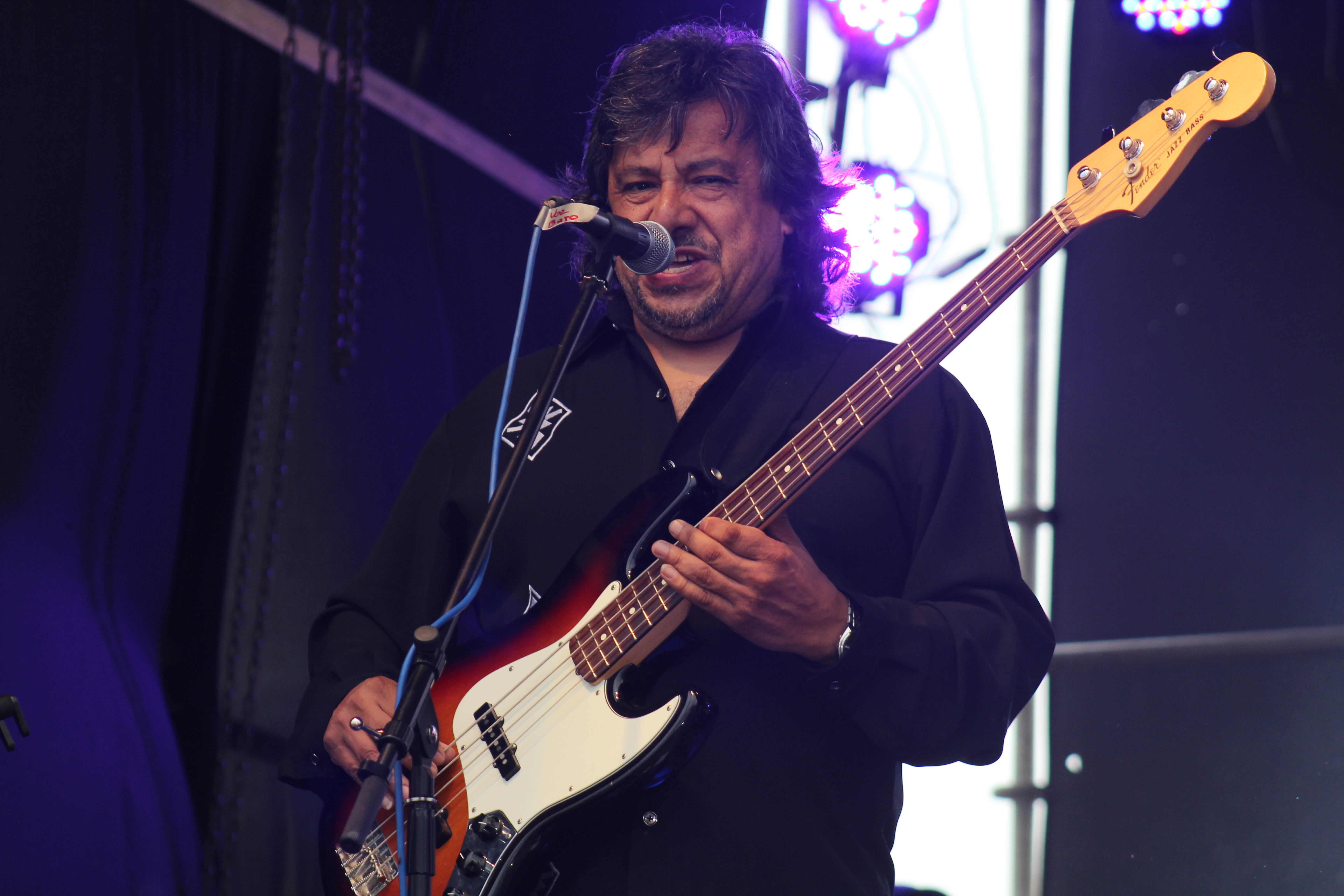 Ministro Víctor Osorio Reyes entrega terreno en Puerto Montt para Museo Monte Verde